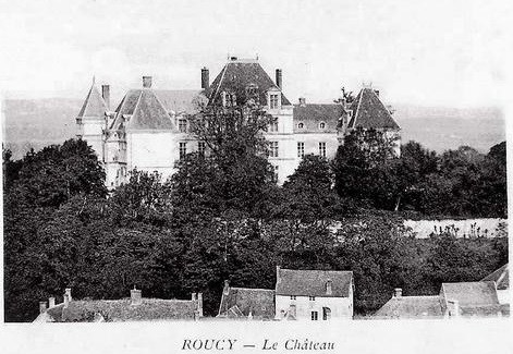 carte postale du château, disparu de Roucy.